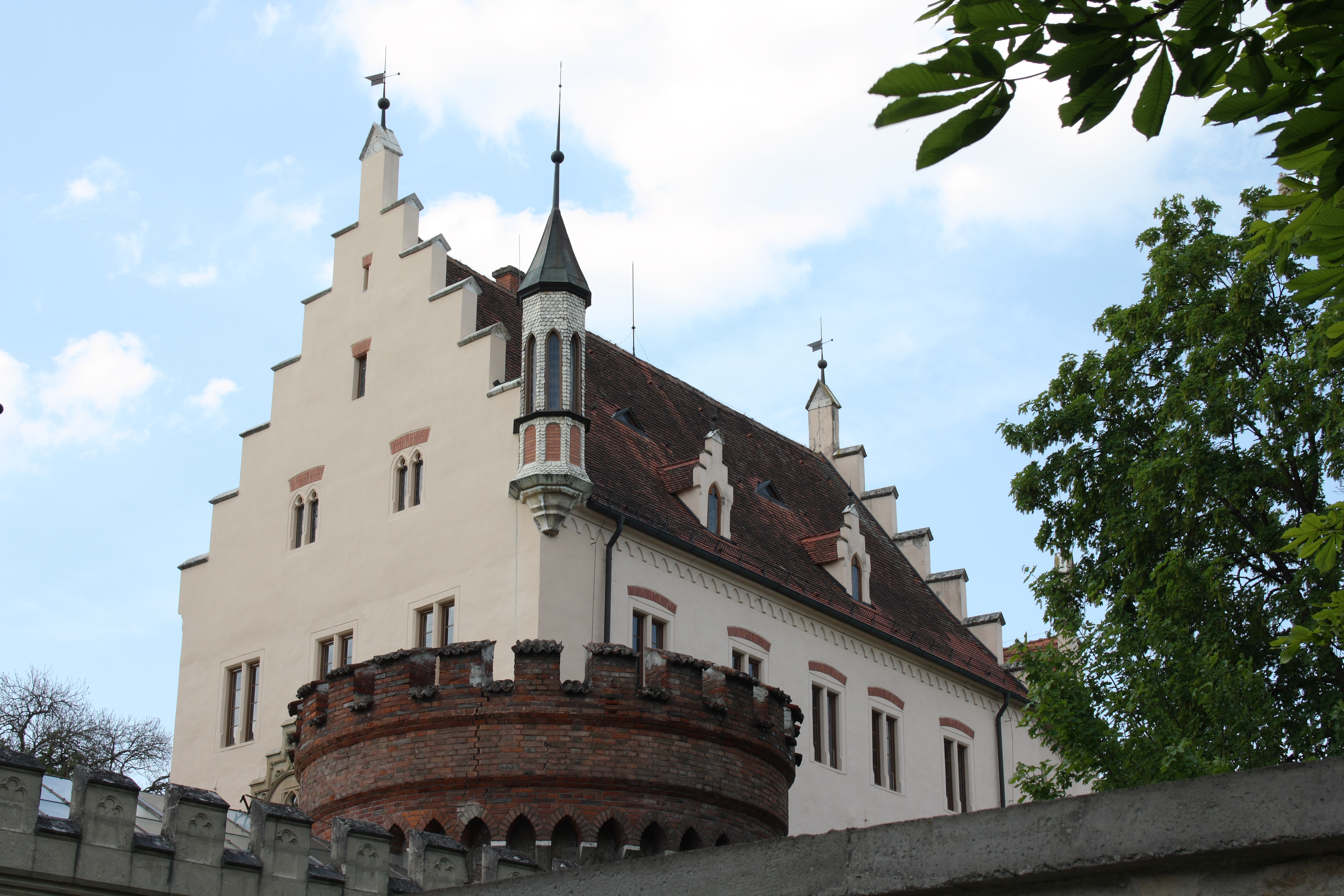 Schloss Haunsheim in der Gemeinde Haunsheim im Landkreis Dillingen an der Donau (Bayern), südliche Hofseite